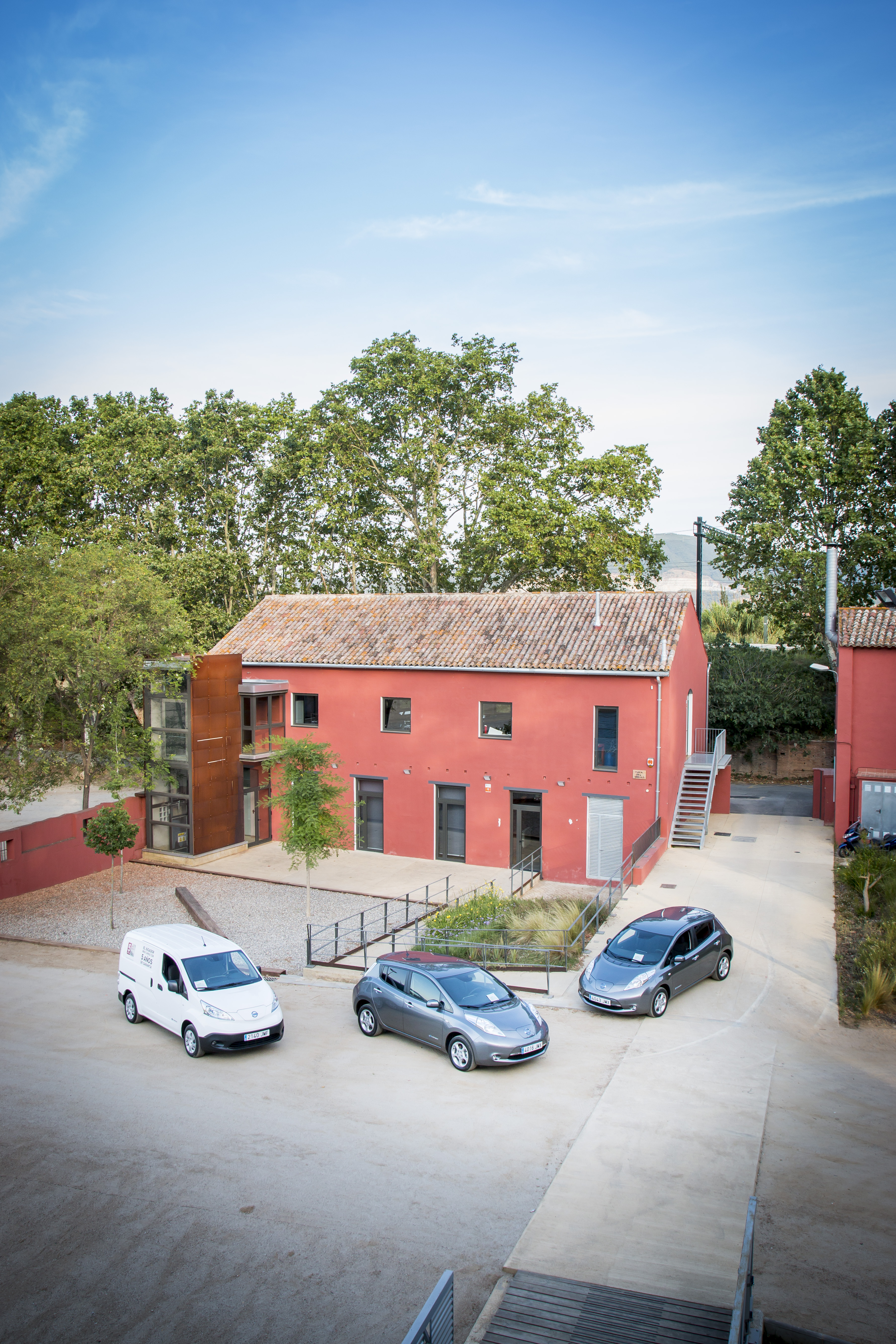 CREVE Centro de recursos del vehículo eléctrico